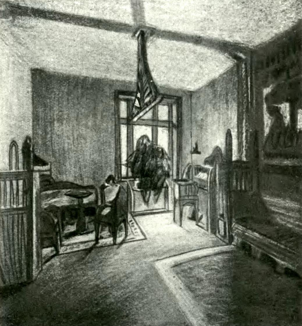 Готельний номер. Проект, що експонувався 1913 року у Львові на виставці товариства «Zespół». Архітектор Веслав Ґжимальський (1891—1941).